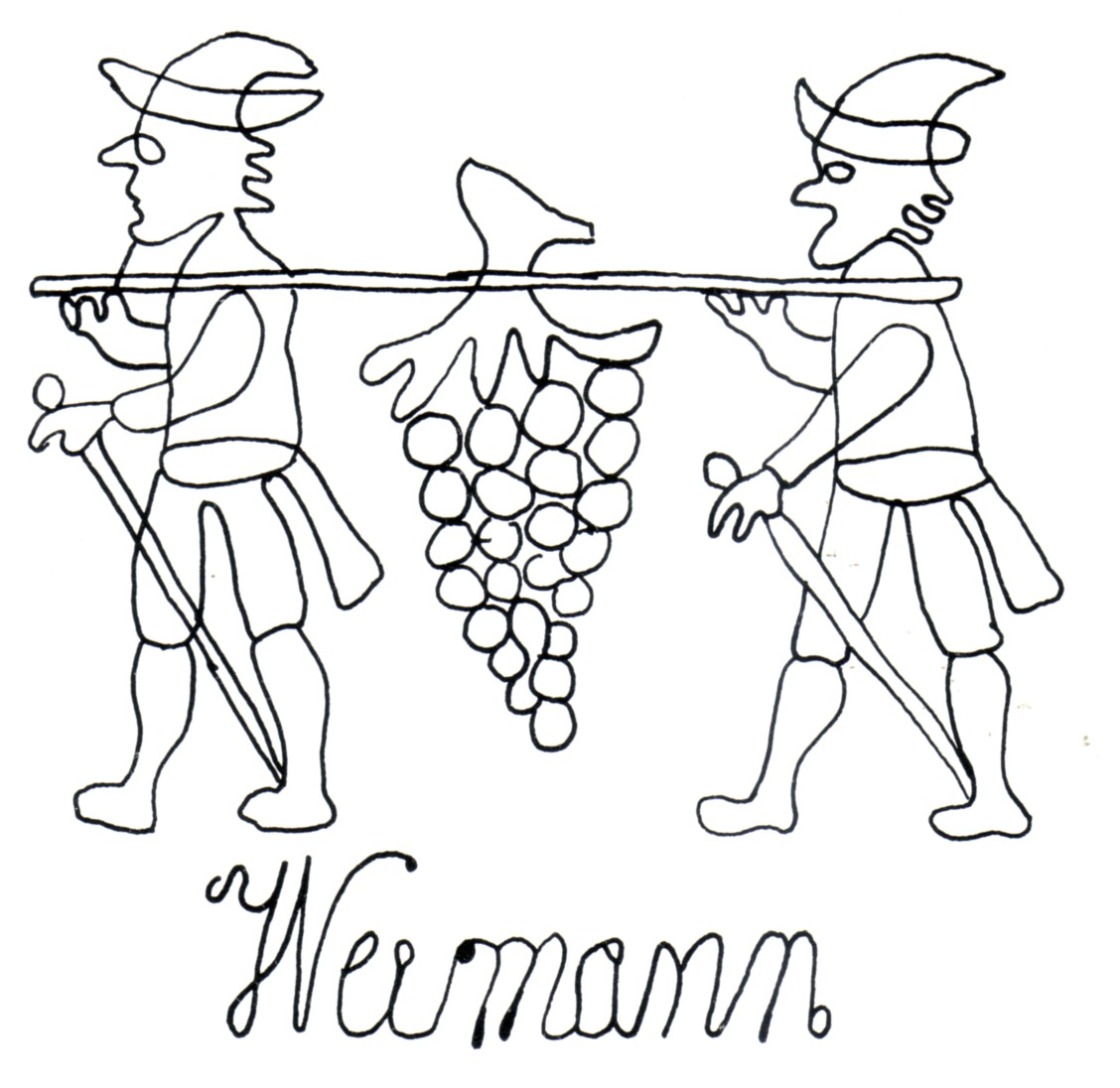 Wasserzeichen aus der Wassmannsmühle bei Weismain, in dieser Form verwendet in der ersten Hälfte des 19. Jhds. Es zeigt zwei biblische Kundschafter, die mit einer großen Traube aus dem "Gelobten Land" wiederkehren.